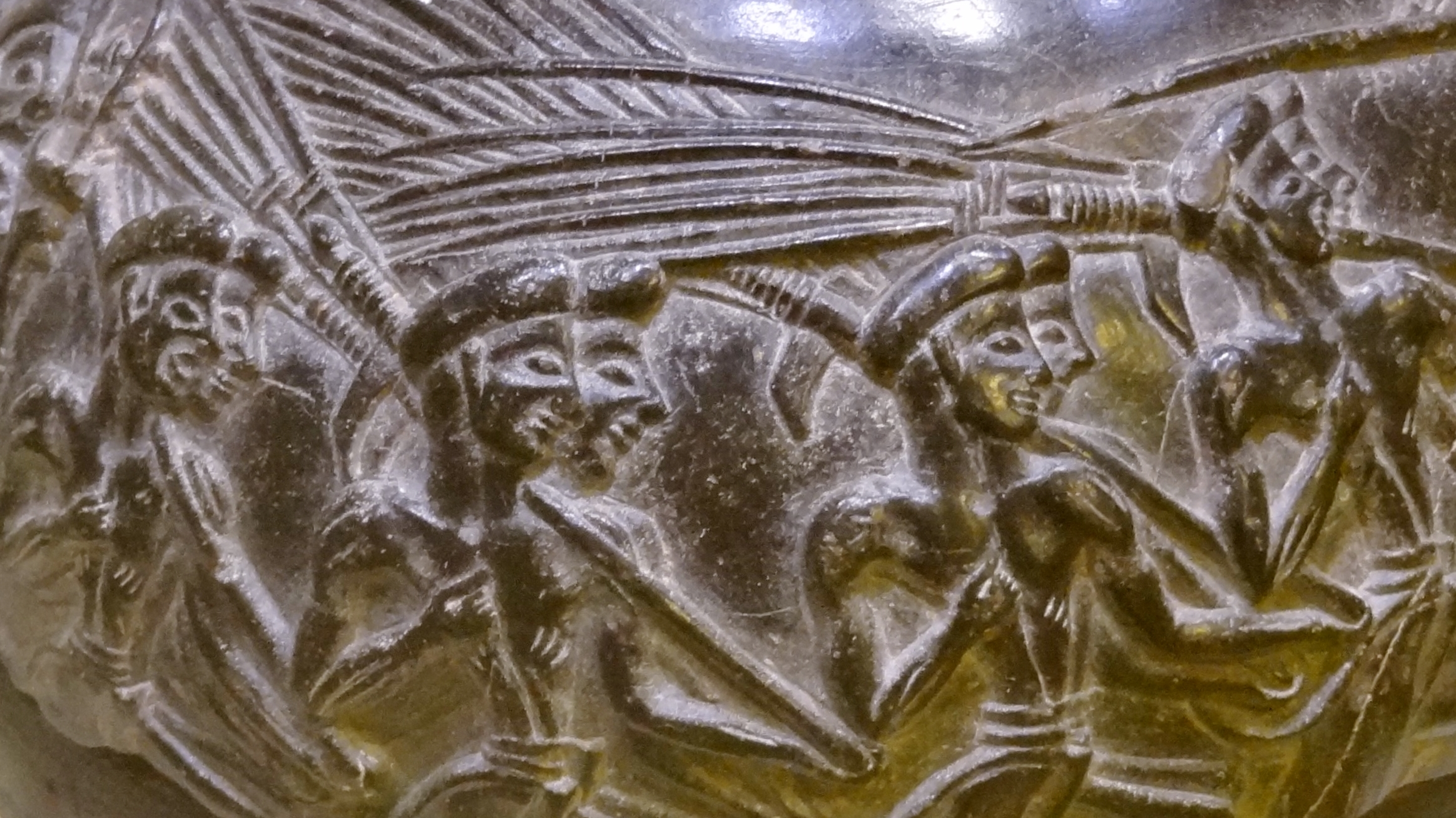 Detail des Reliefs der „Schnittervase“, Reliefrhyton aus Speckstein (Neupalastzeit 1500–1450 v. Chr.) aus Agia Triada, ausgestellt im Archäologischen Museum Iraklio, Kreta, Griechenland